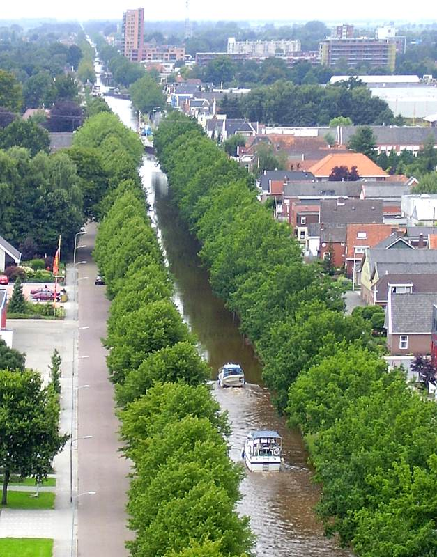 Stadskanaal vanaf de watertoren, Eigen foto, genomen op 12-8-2005.